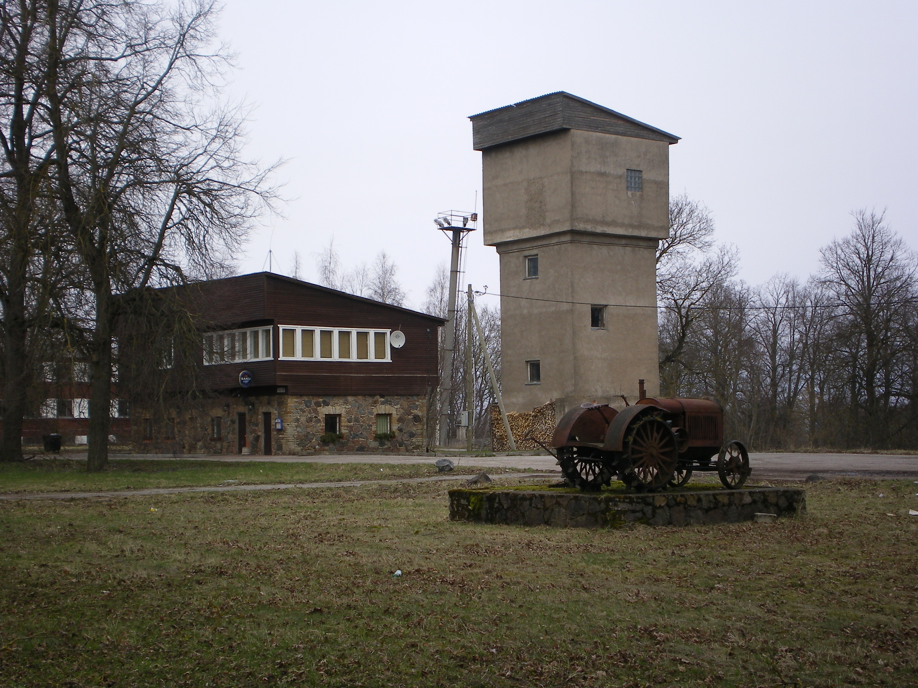 Vana traktor Voka mõisa hoovis. Tagapool paistmas veetorn.